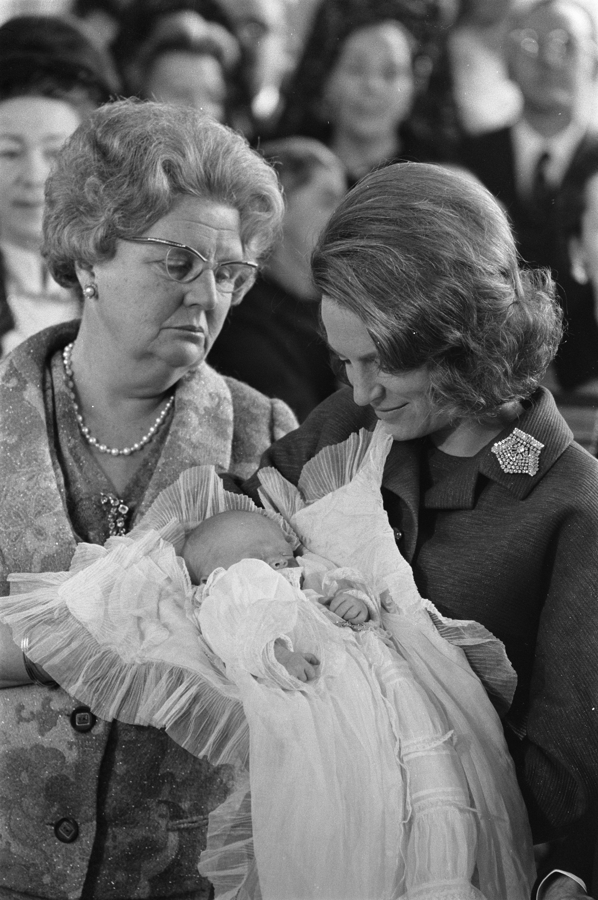 Collectie / Archief : Fotocollectie Anefo Reportage / Serie : [ onbekend ] Beschrijving : Doop van prins Carlos Xavier Bernardo , zoon van prinses Irene , op Kasteel Lignieres (Frankrijk). Prinses Irene met zoon en koningin Juliana Datum : 10 februari 1970 Locatie : Lignières Trefwoorden : doopplechtigheden, koninginnen, prinsen, prinsessen Persoonsnaam : Carlox Xavier Bernardo, Irene, prinses, Juliana (koningin Nederland), Juliana, koningin Fotograaf : Evers, Joost / Anefo Auteursrechthebbende : Nationaal Archief Materiaalsoort : Negatief (zwart/wit) Nummer archiefinventaris : bekijk toegang 2.24.01.05 Bestanddeelnummer : 923-2417